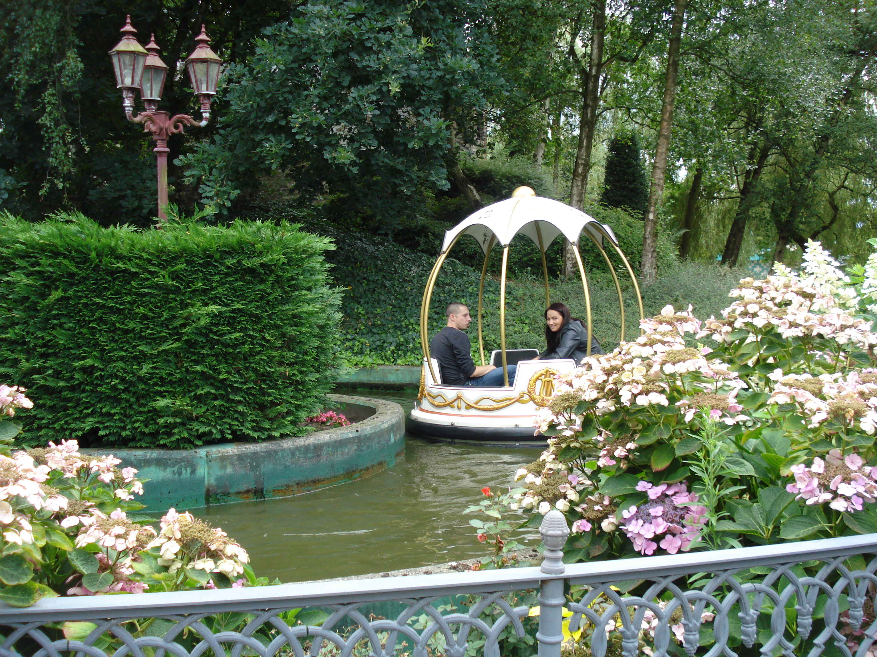 Bootvaart